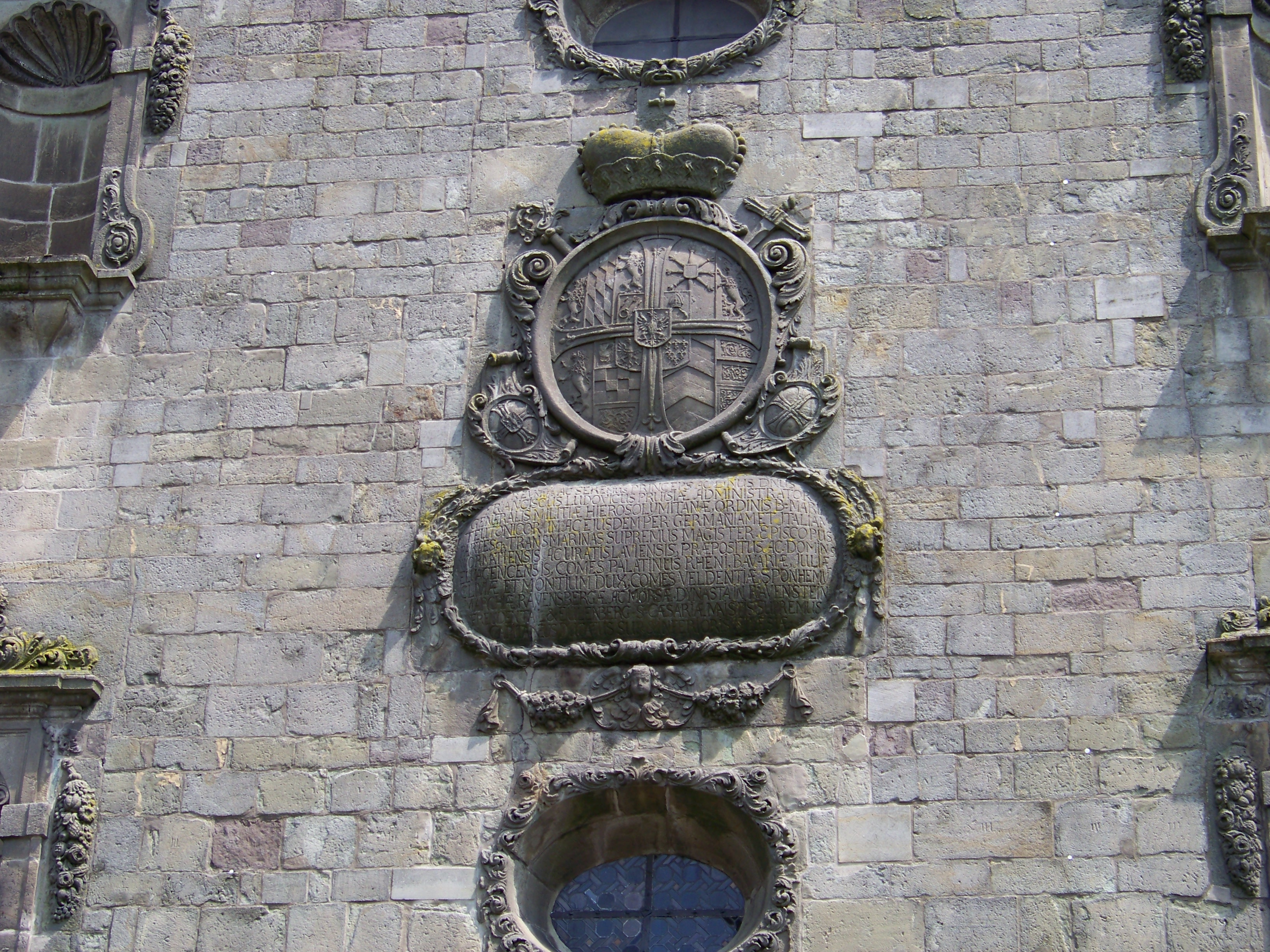 Kirche St. Margaretha, Warstein-Sichtigvor (Germany)